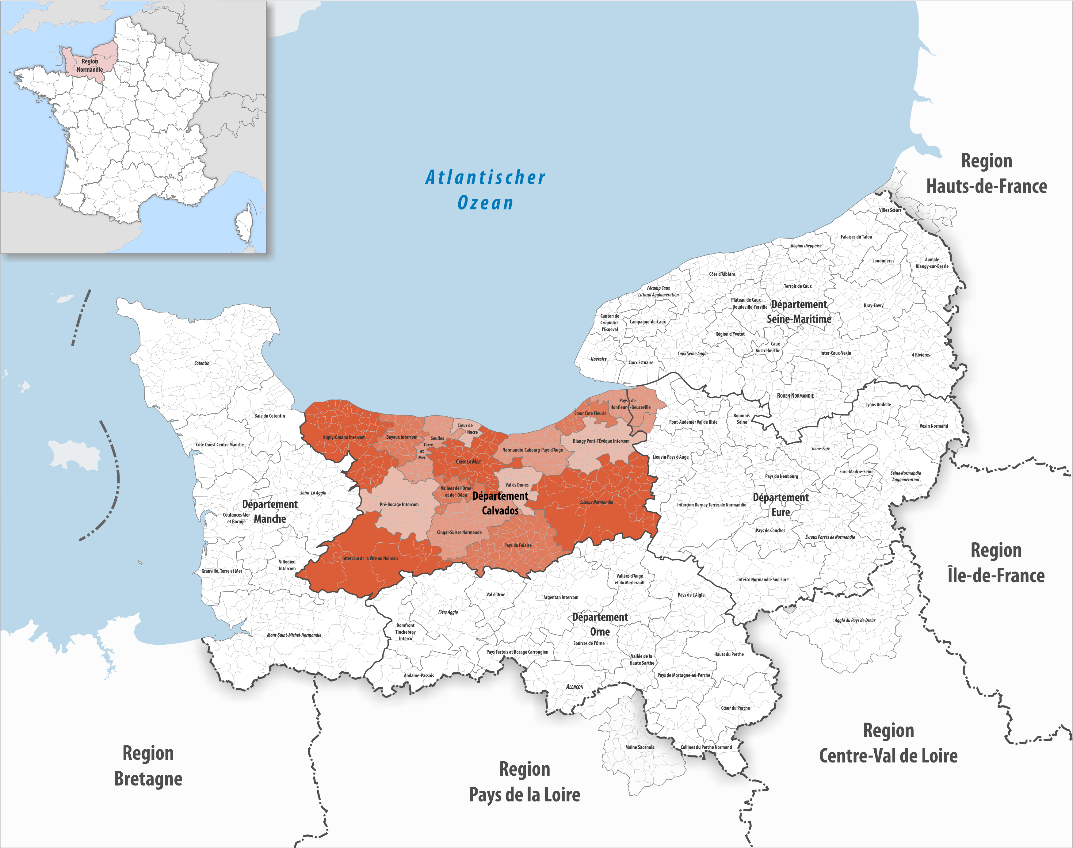 Gemeindeverbände im Département Calvados